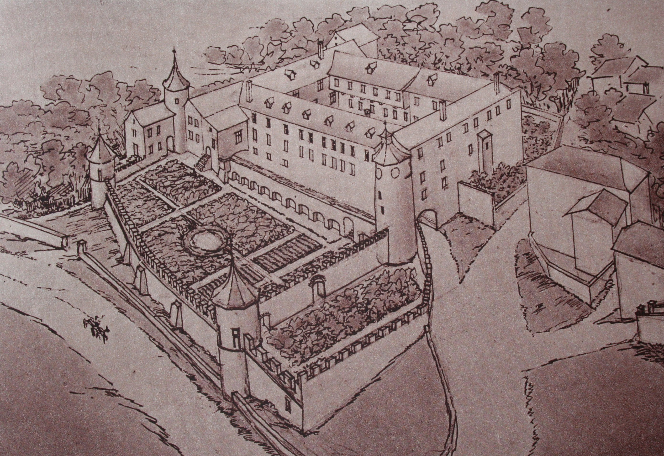 Schloss Haldenstein 1880, Zeichnung von J.R. Rahn